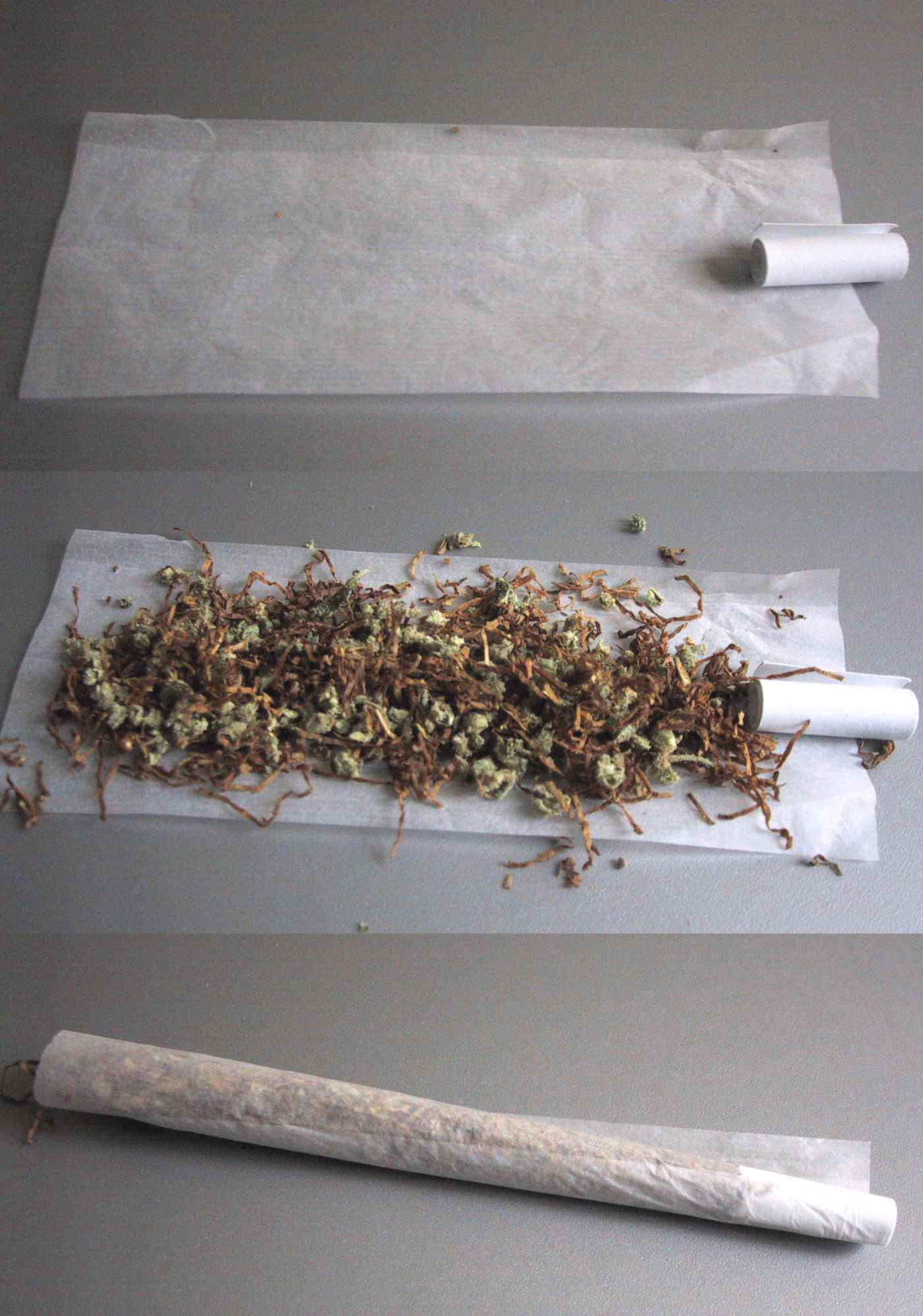 Me - 21/11/2005